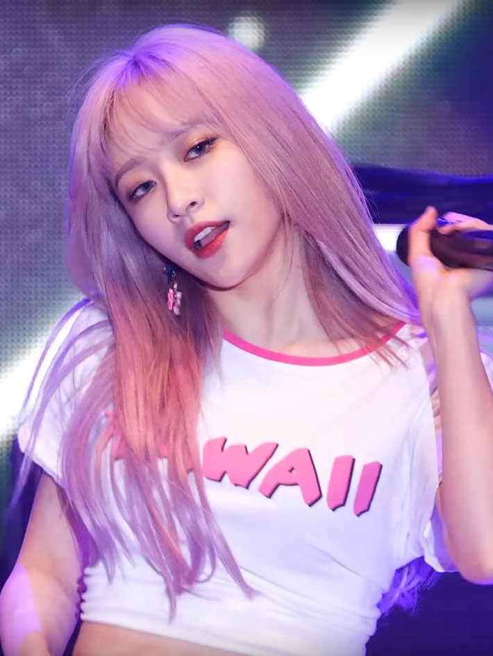 171031 평창동계올림픽 G-100